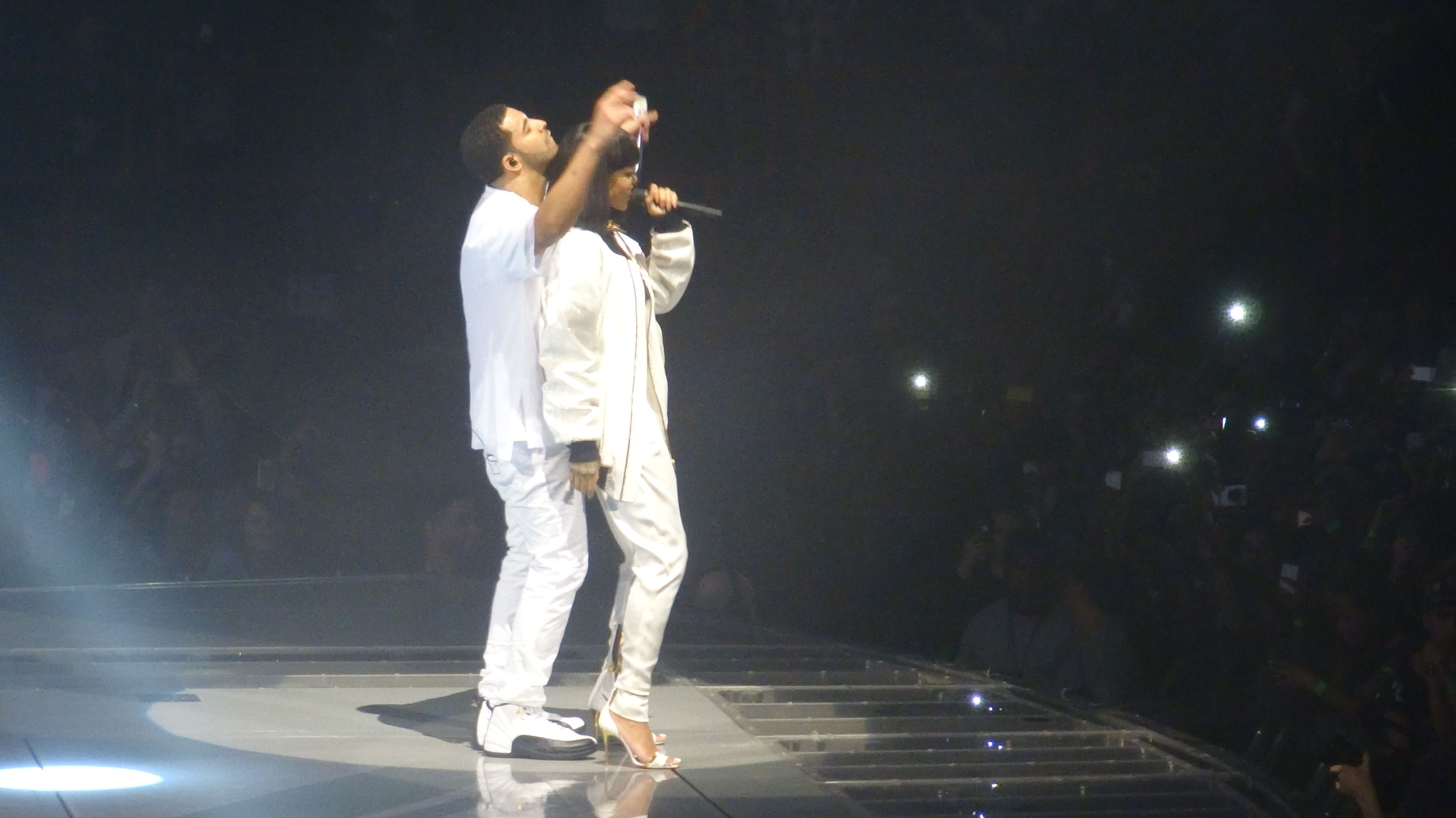 Rihanna e Drake ao vivo na Would You Like a Tour